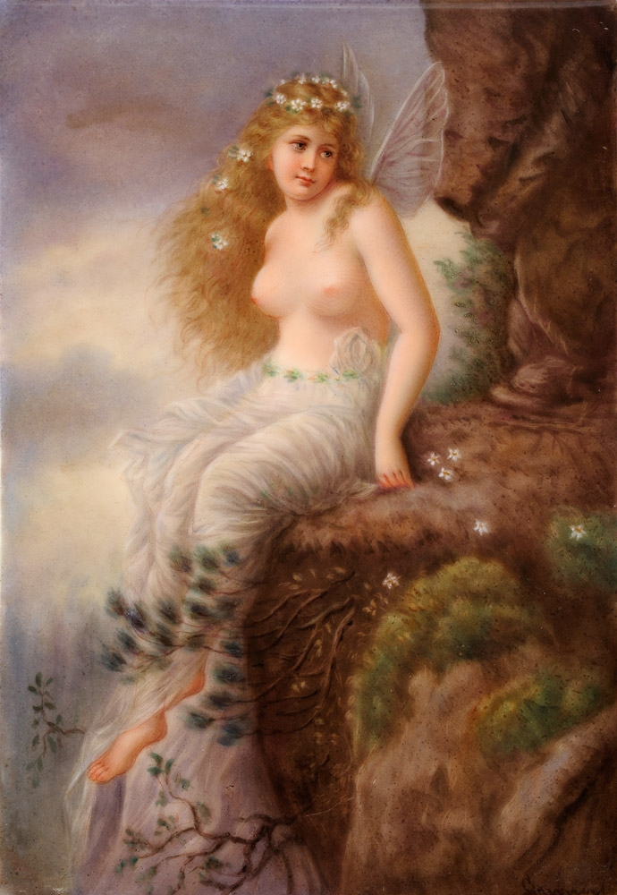 Porzellan-Bildplatte Oreade. Undeutlich signiert. 19 x 13,5 cm